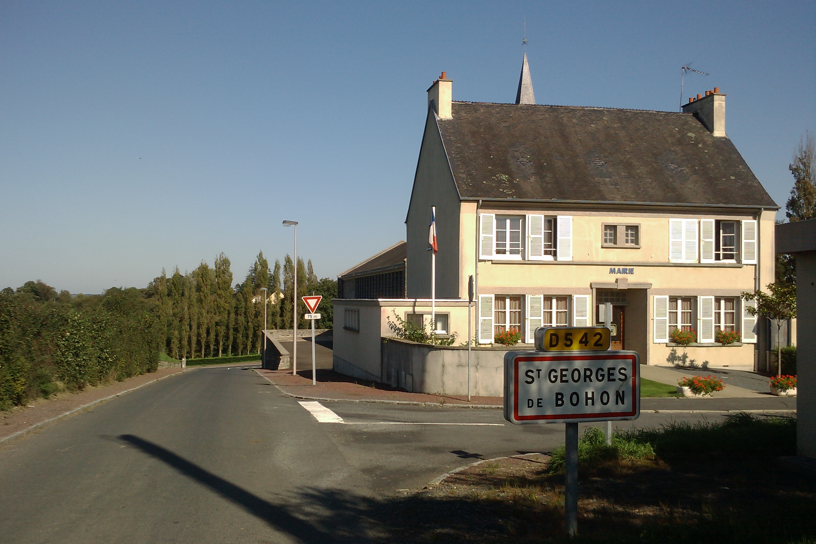 Saint-Georges-de-Bohon